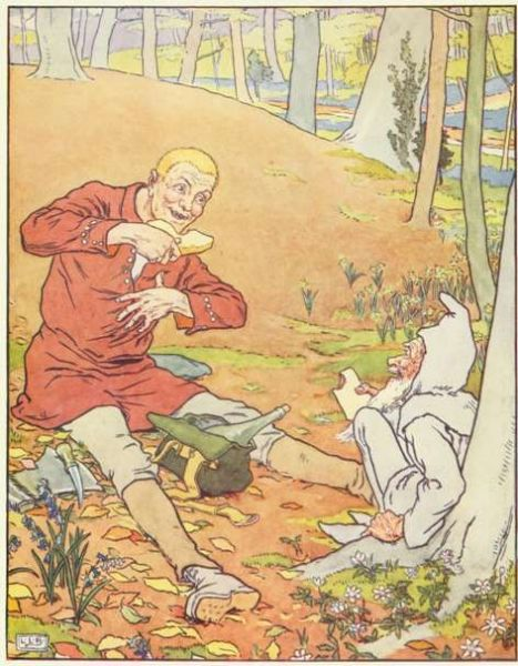 Leslie Brooke, Golden Goose : Simplet partage son repas avec le nain affamé et assoiffé.